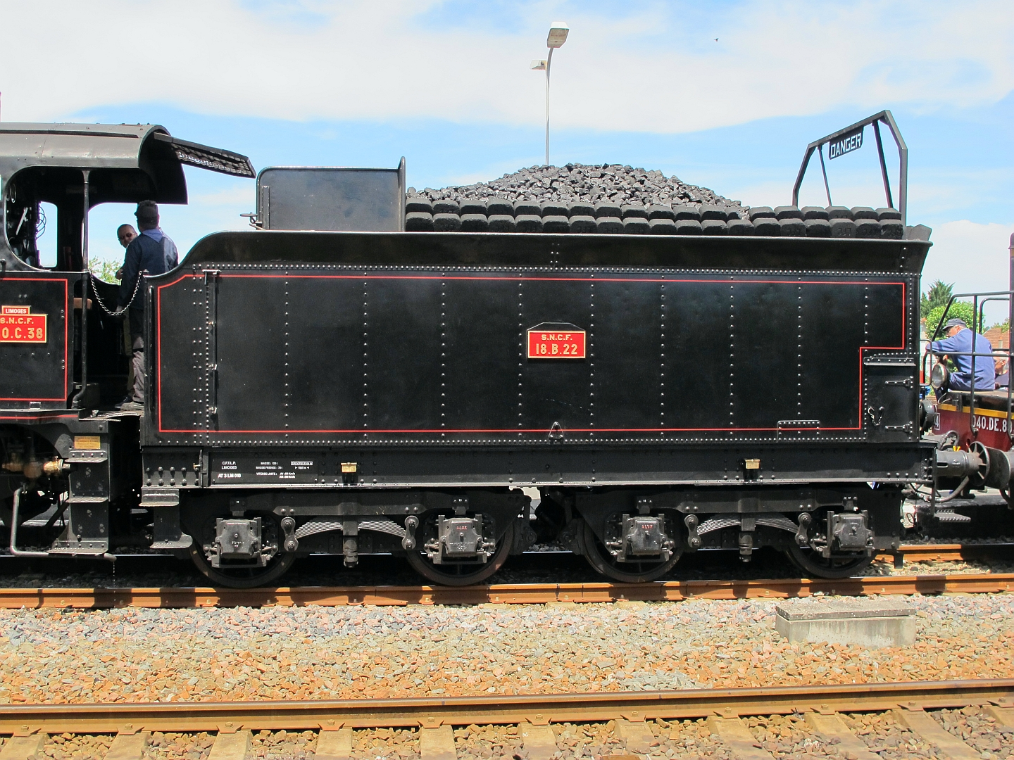 Le tender 18 B 22 attelé à la 140 C 38 du Chemin de Fer Touristique Limousin Périgord, en gare de Thiviers (Dordogne) le 12 juillet 2015.